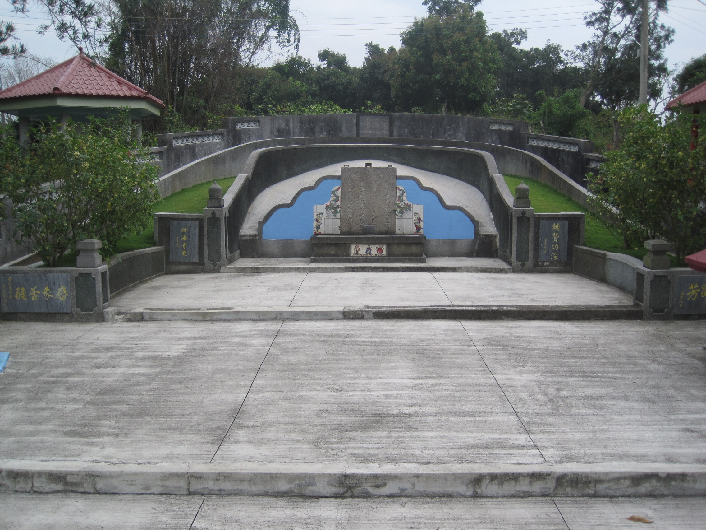 陳永華墓原址及墓碑